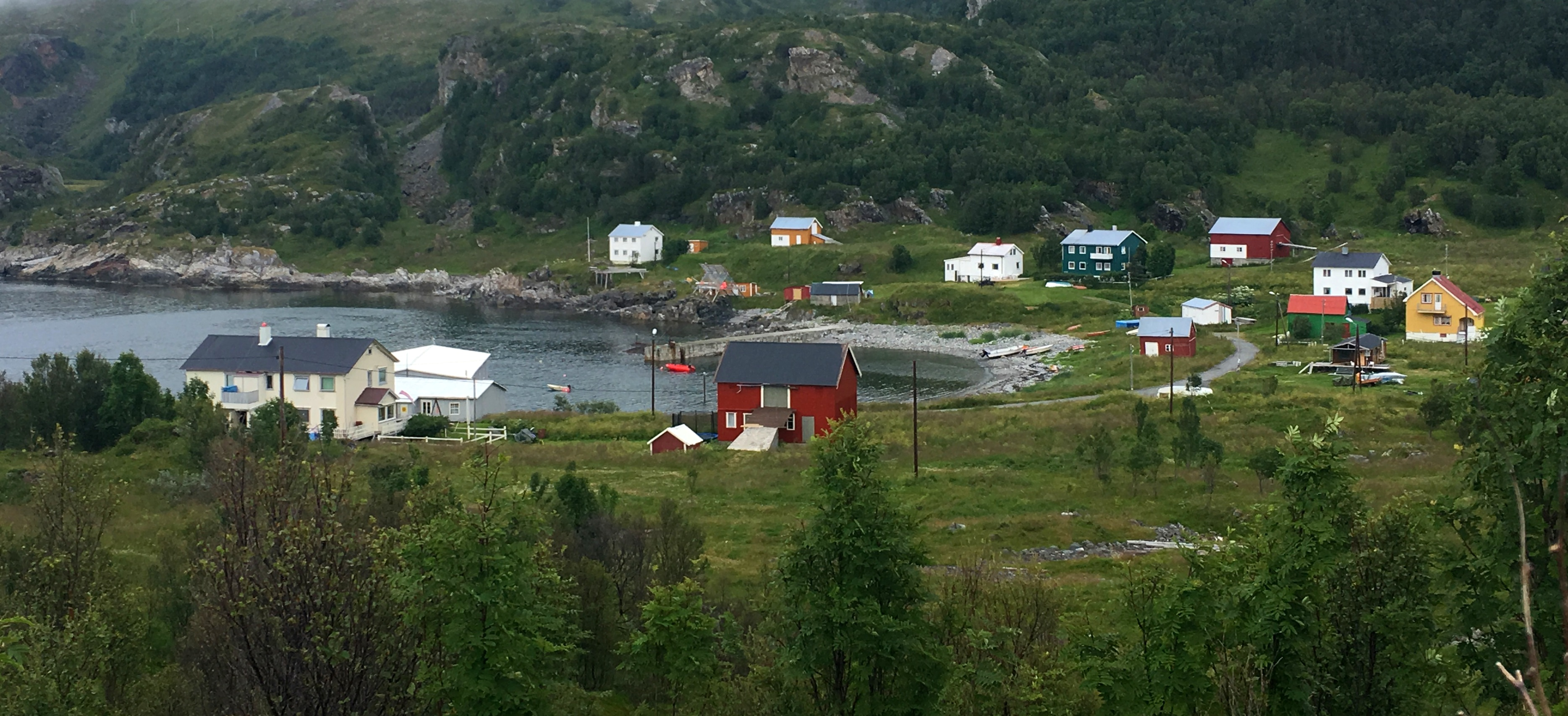 Andsnes